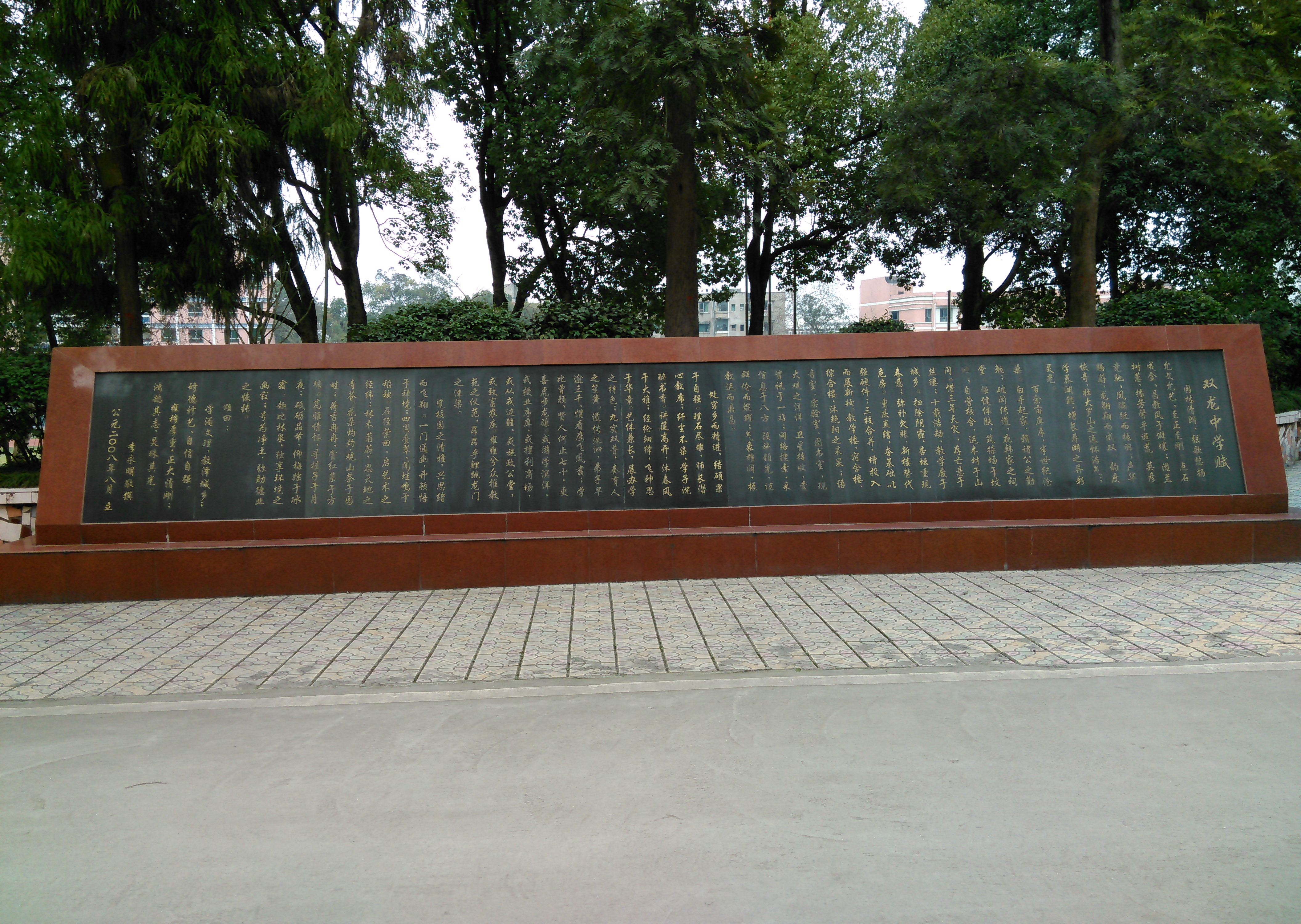 图片拍摄于2014年2月14日，拍摄于重庆市长寿双龙中学校，这是我自己的作品。